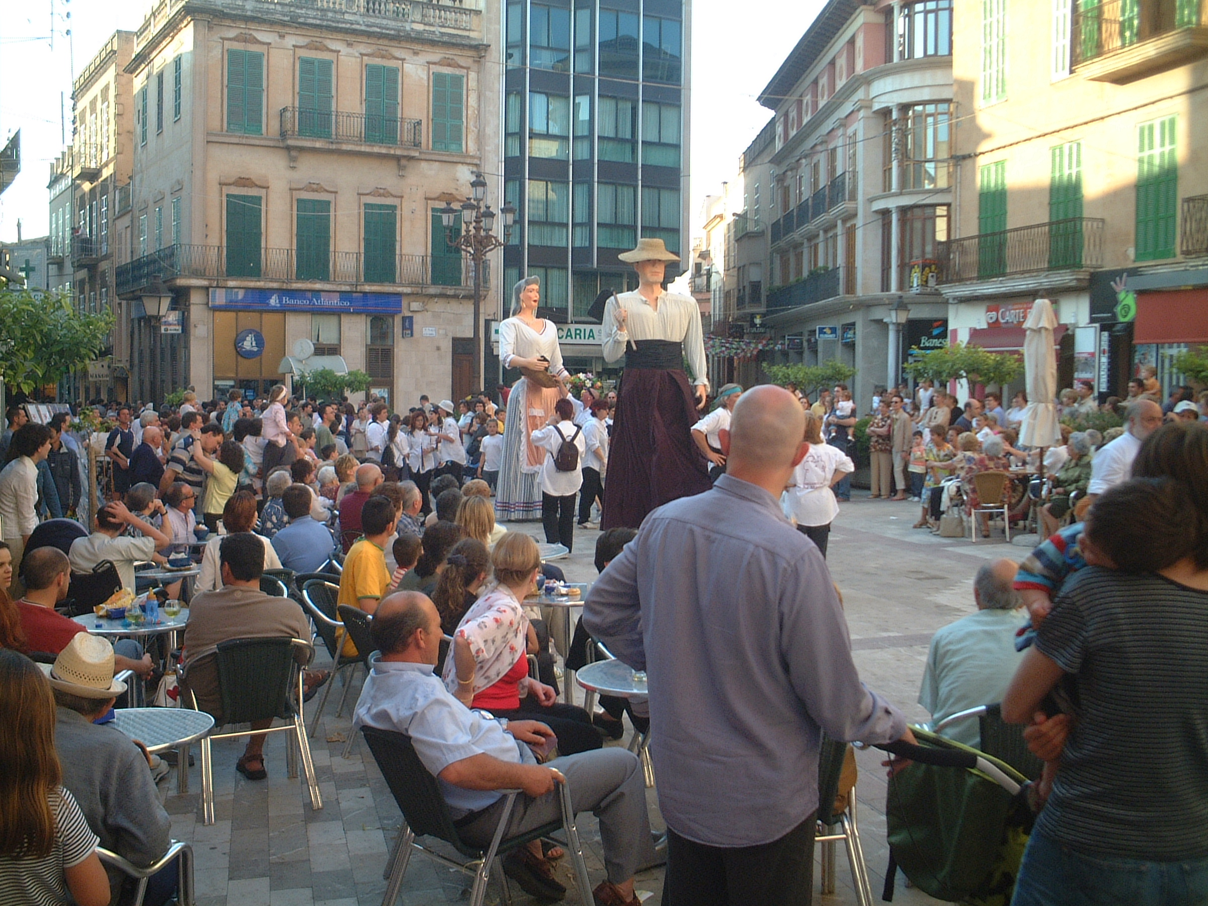 Data: juny 2004 Autor:Joan Miquel Camera:Fuji Trobada de gegants a Sa Bassa (Manacor)